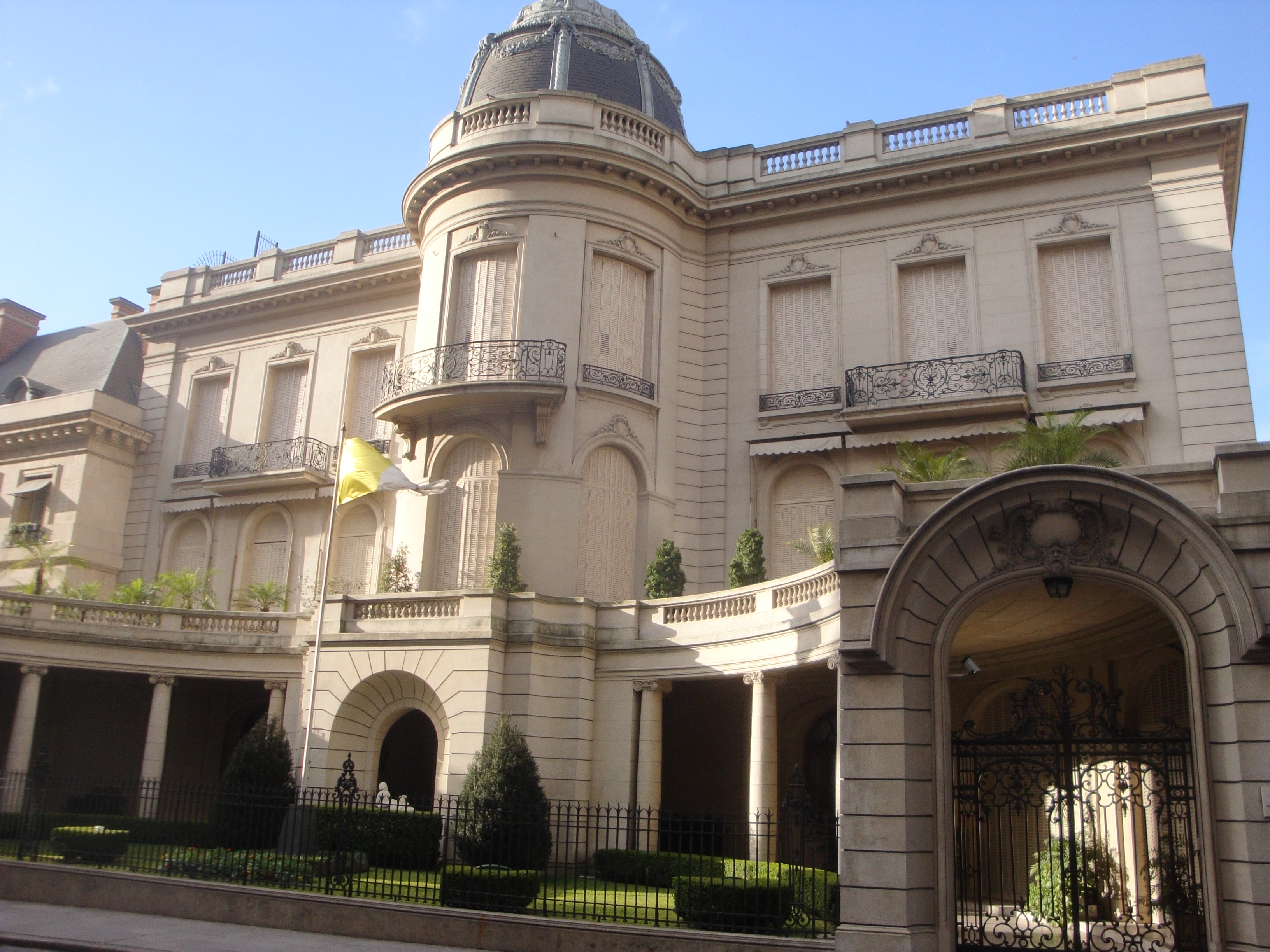 Nunciatura Apostólica